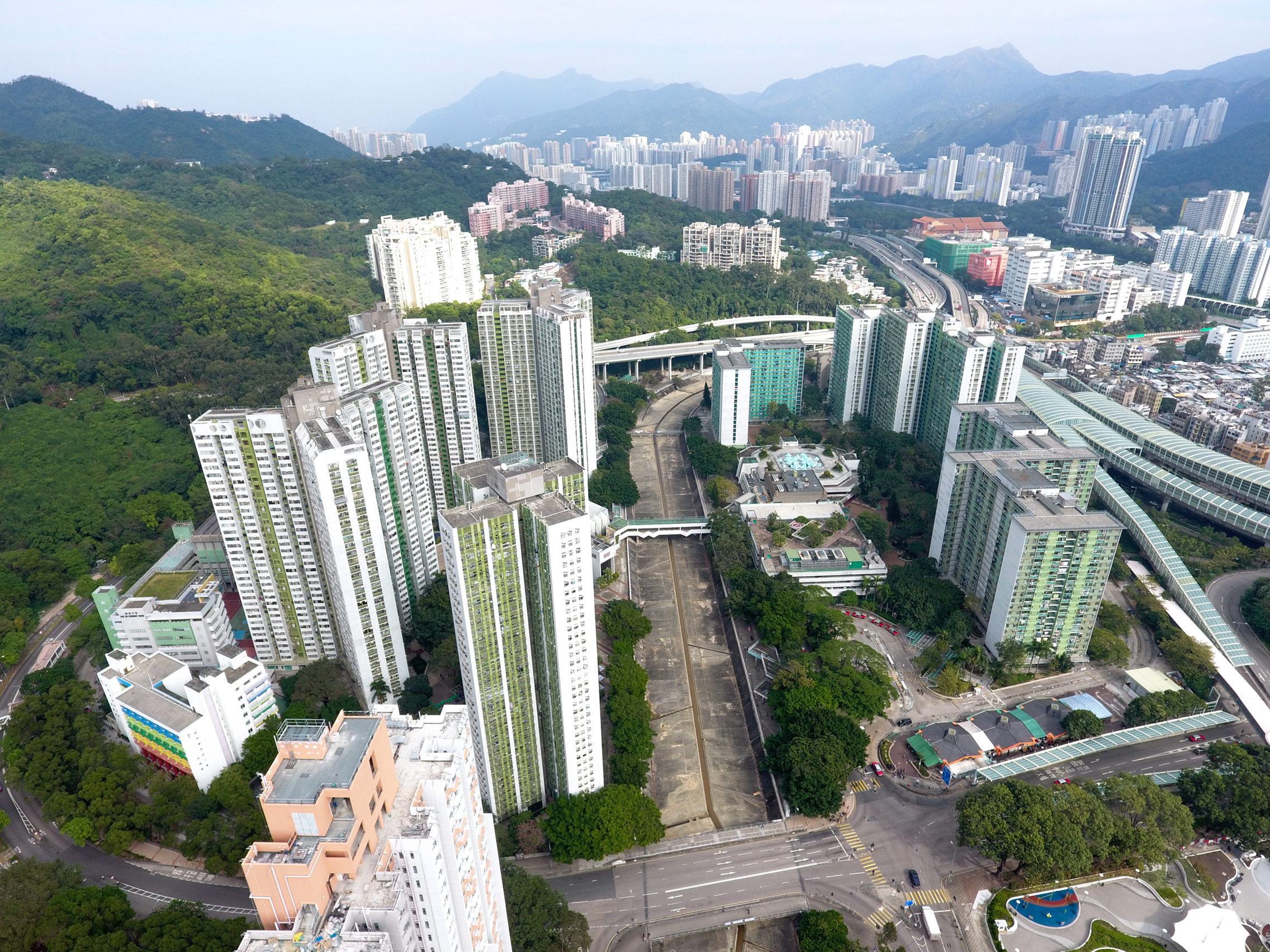 Mei Lam Estate Overview